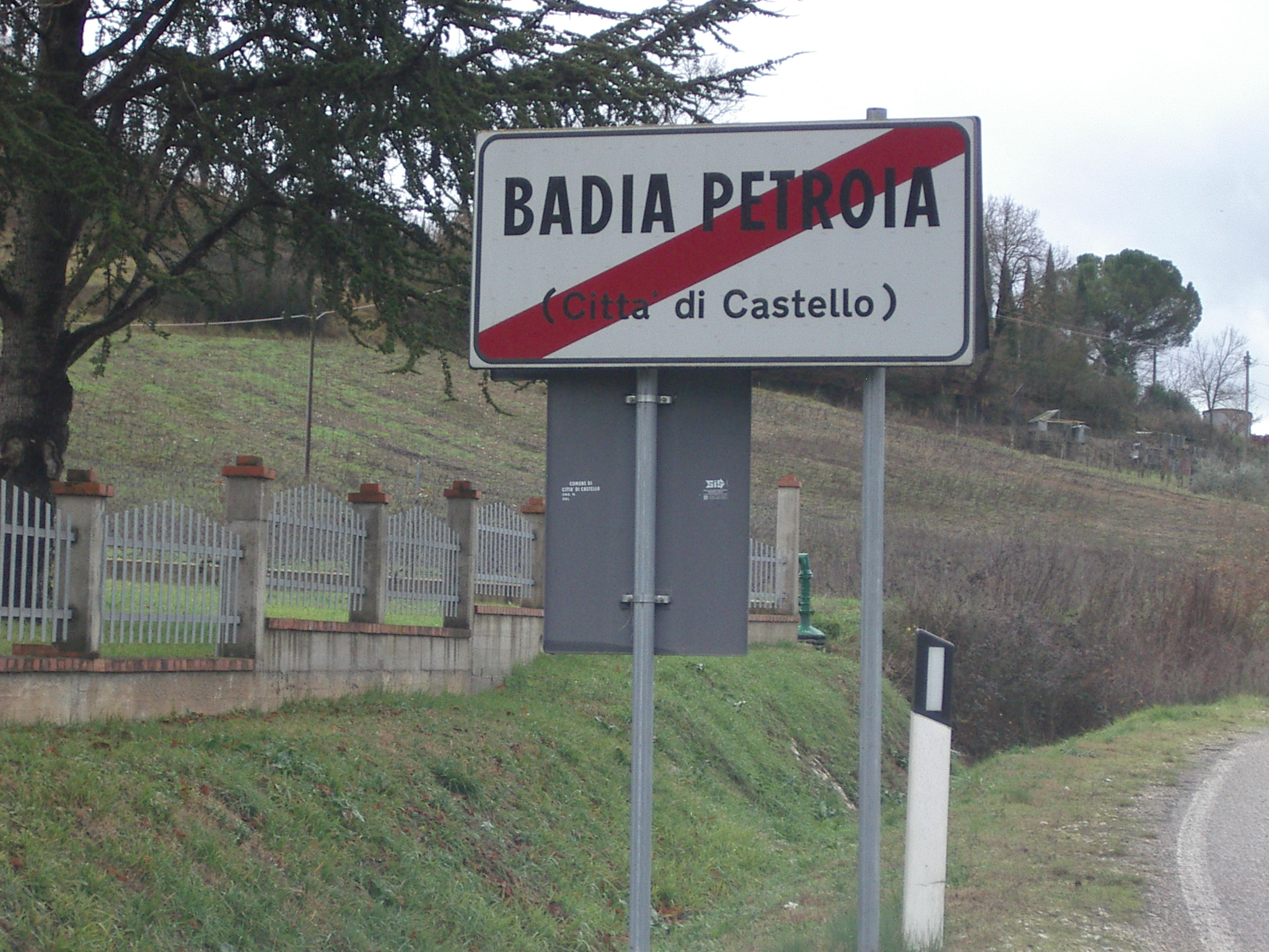 Iñupiak: Badia Petroia è una frazione del comune di Città di Castello (PG). Resti del monastero e della chiesa in stato di degrado architettonico e strutturale